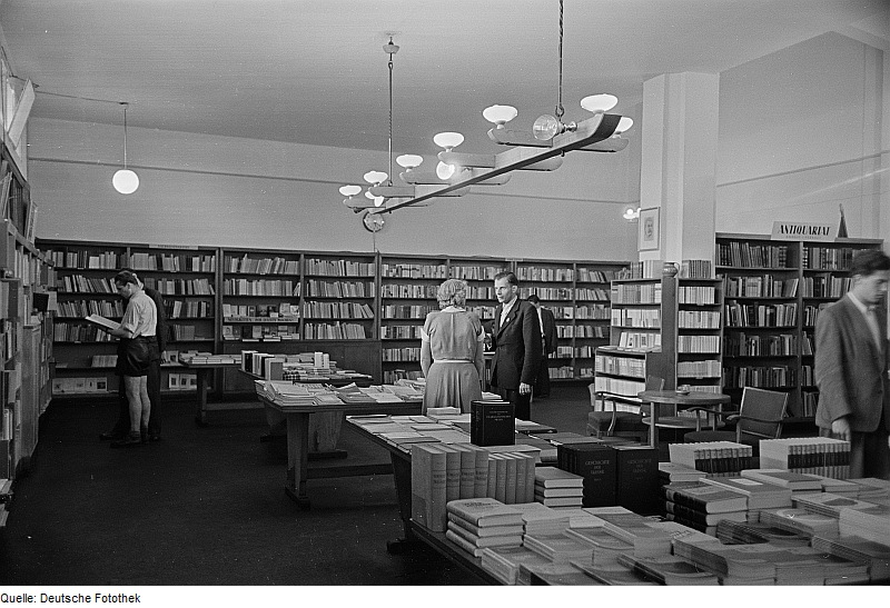 Original image description from the Deutsche Fotothek Innenansicht einer Buchhandlung